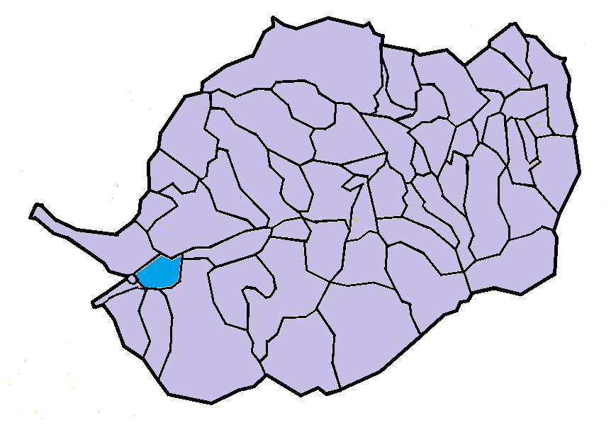 Sautó en el Conflent, a partir del mapa municipal del Conflent de lliure disposició adaptat al Nomenclàtor toponímic aprovat el 2007